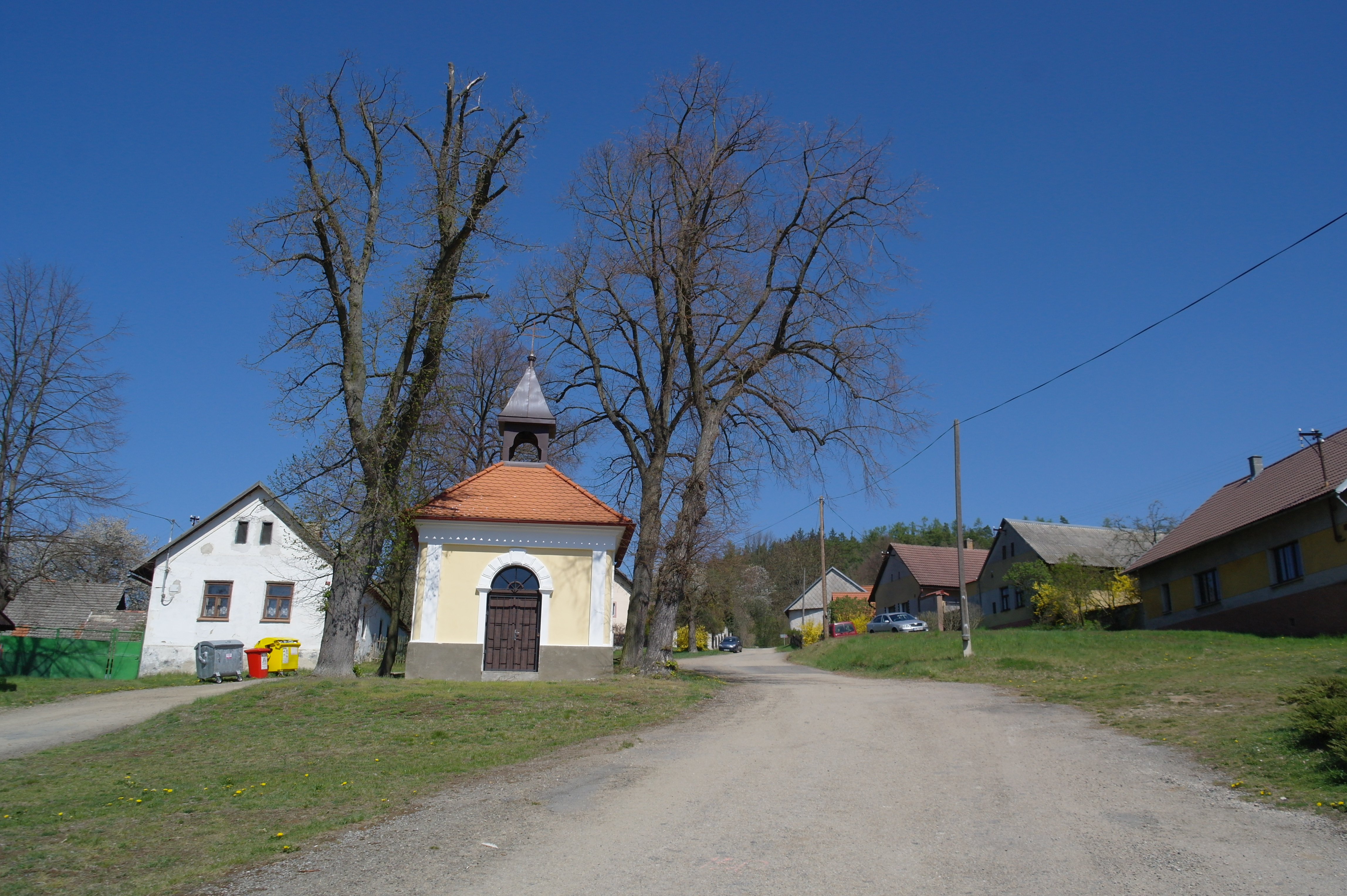 Hrzín (Ratměřice). Česká republika.